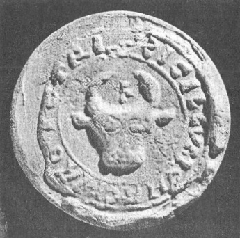 Hahót nembeli (I.) Csák körpecsétje 1268-ból (ökörfej kereszttel)